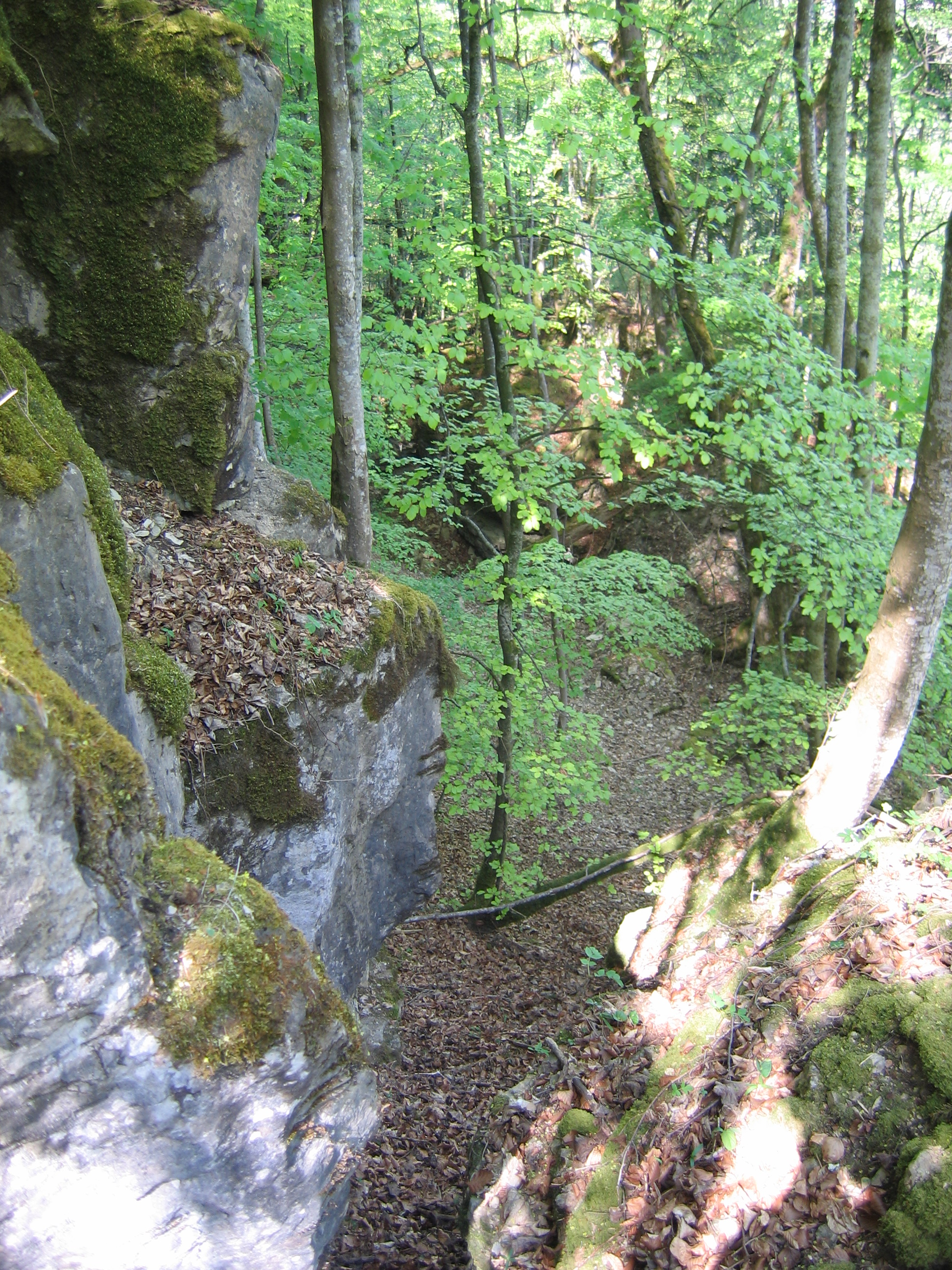 Gesteinsformation bei Stühlingen, Landkreis Waldshut, Baden-Württemberg. Name nach historischer Überlieferung